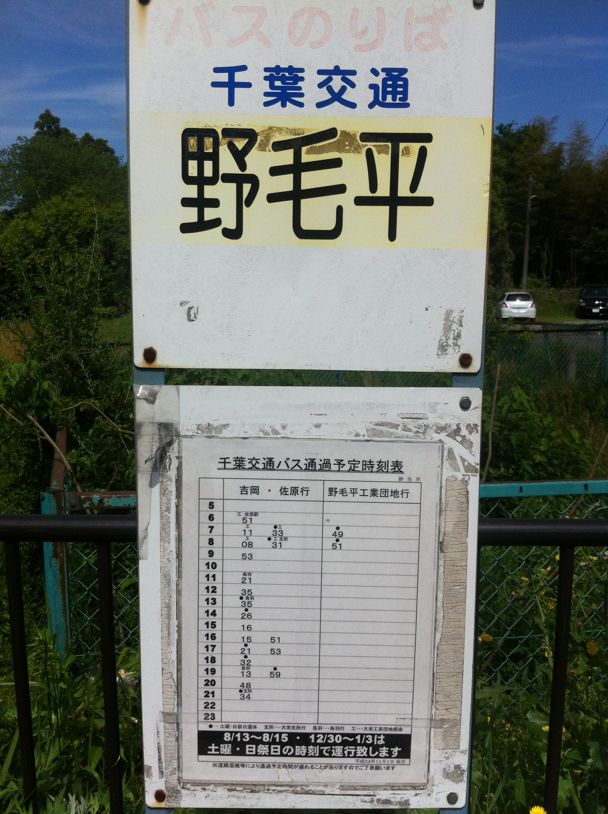 野毛平時刻表